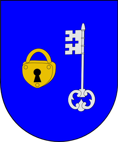 Chasco: En azur, una llave, de plata, puesta en palo y acompañada, en lo diestro, por un candado de oro.